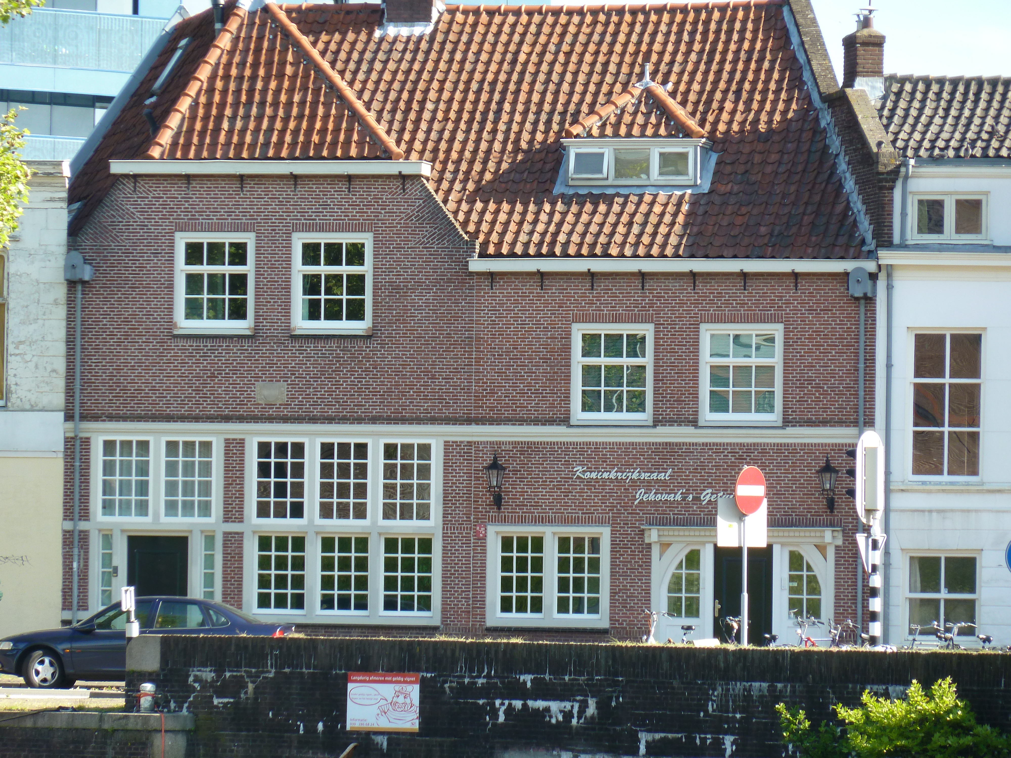 Wittevrouwensingel 92, Utrecht, NL. In 1920 het kantoor van de Wijkmeester van de Gemeentereiniging, in 1986 Koninkrijkszaal Jehova's Getuigen.